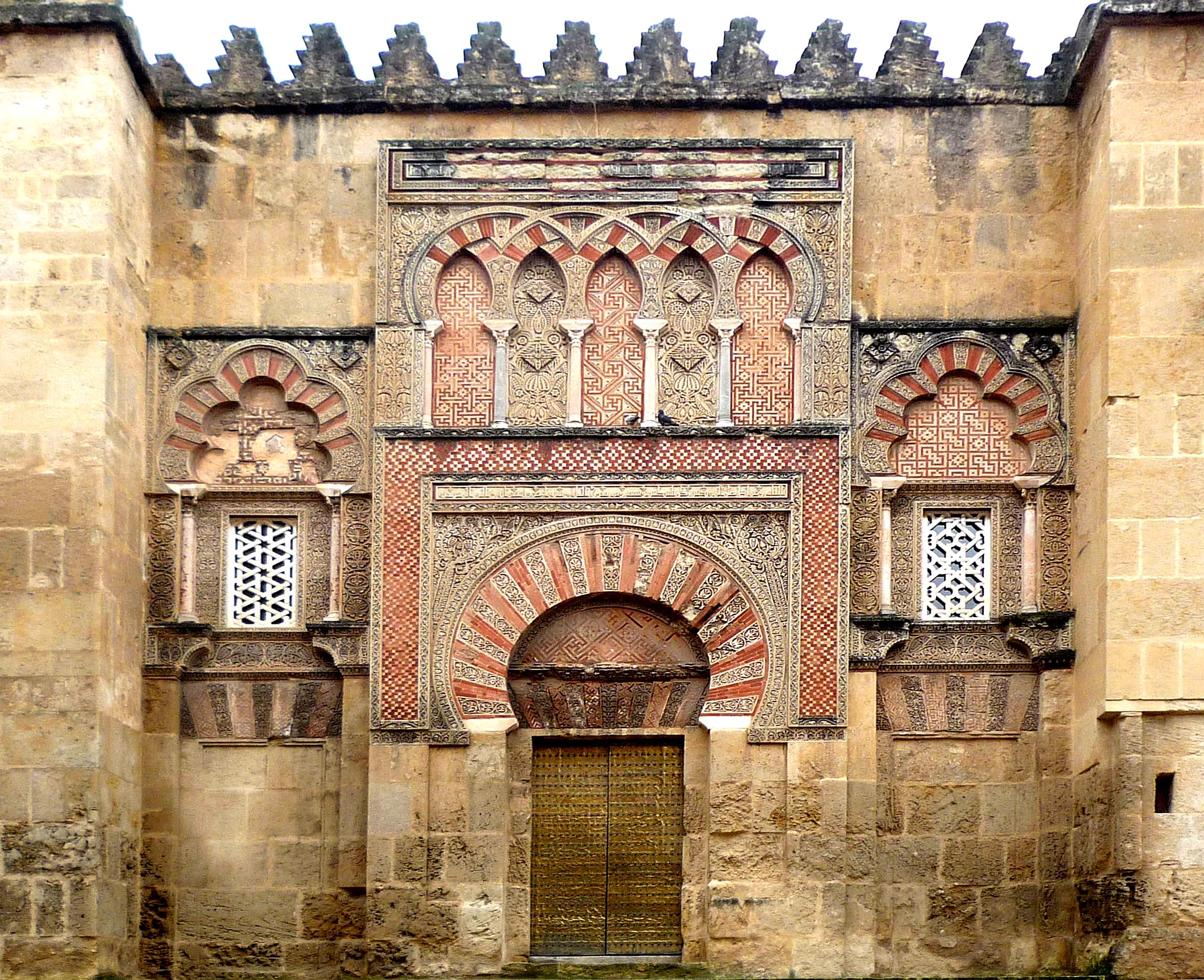 Puerta de San Ildefonso de la Mezquita de Córdoba (España).